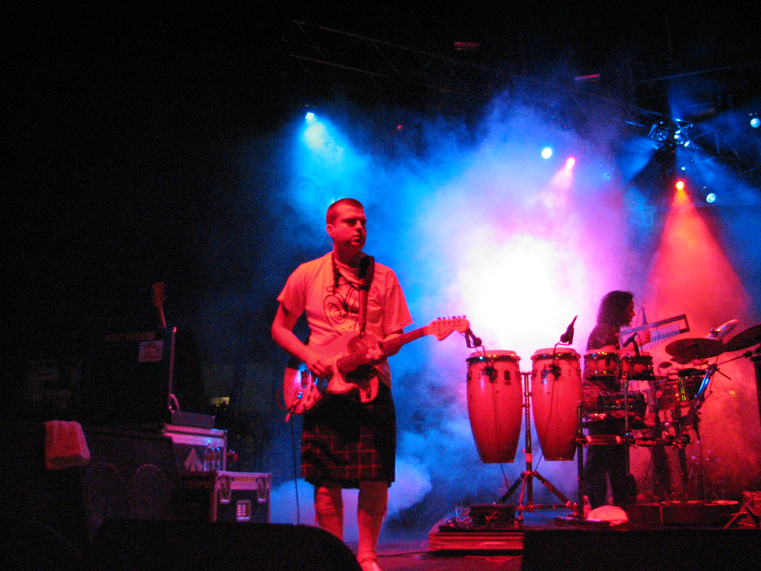 Basement Jaxx on Detour festival 2006